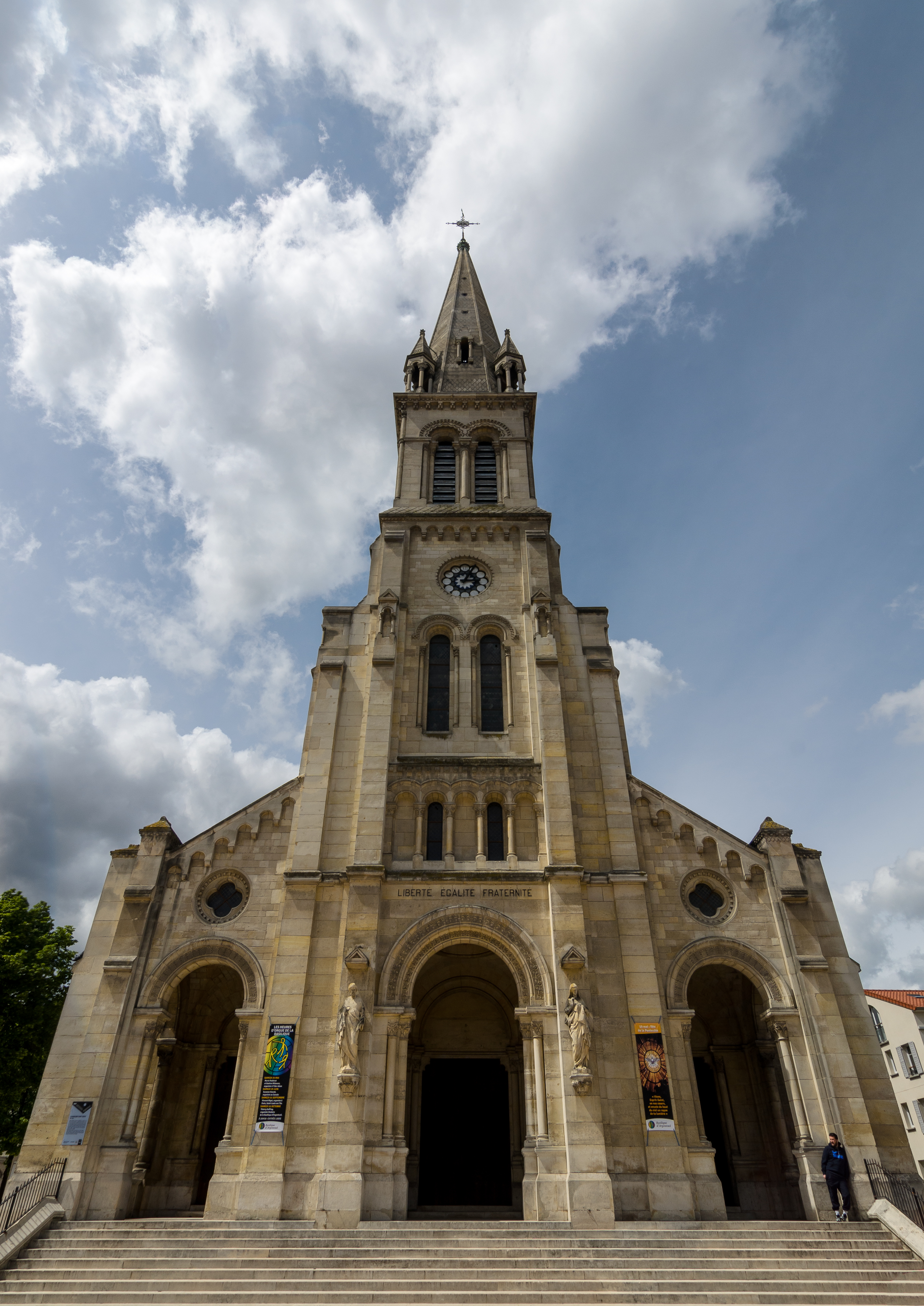 Parvis de la Basilique d'Argenteuil